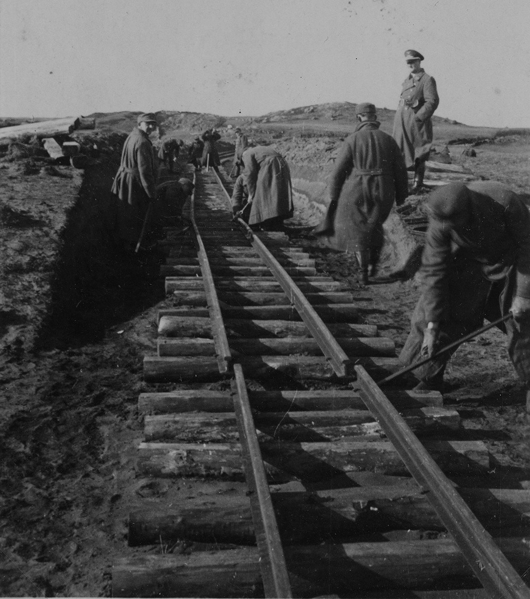 Lundebanen – jernbanen som okkupasjonsmakten fikk bygd på Lista (Foto Lista museum)